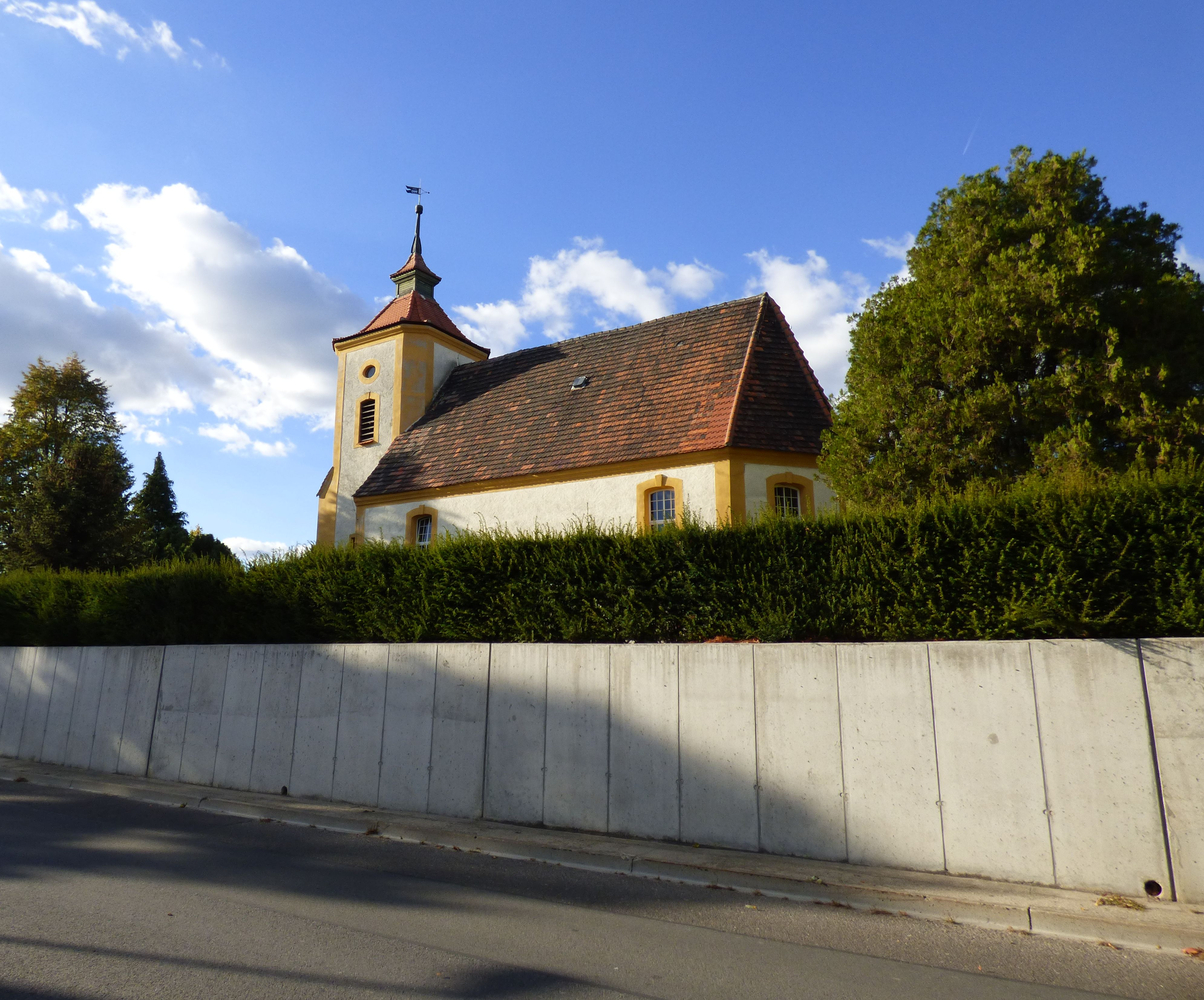 Friedhofsmauer an der Dorfkirche Dreska